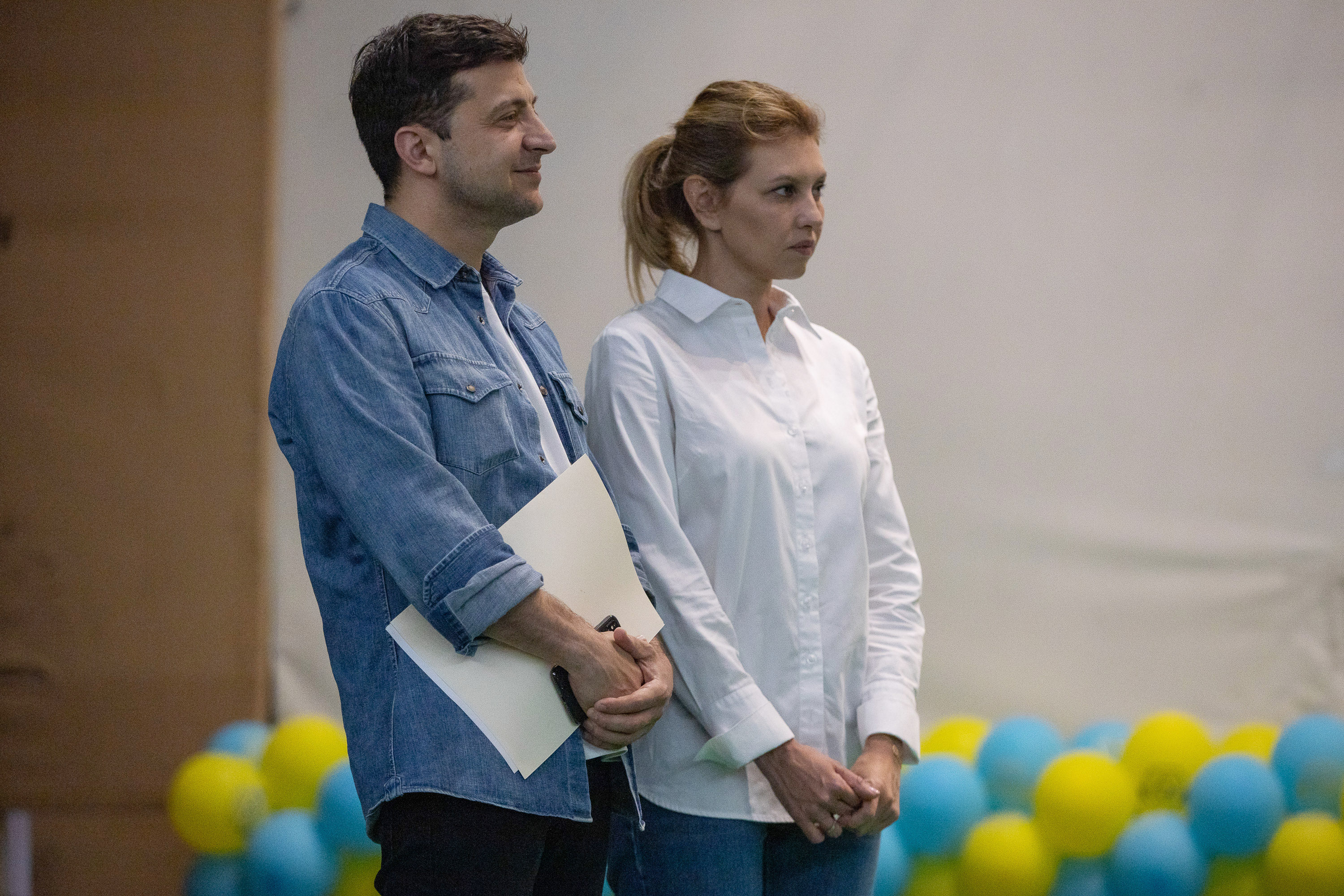 Президент України Володимир Зеленський разом із дружиною Оленою взяв участь у відкритті 11-го спортивно-терапевтичного табору Міжнародної антинаркотичної асоціації. Його влаштували у пансіонаті «Пролісок» на Київщині.